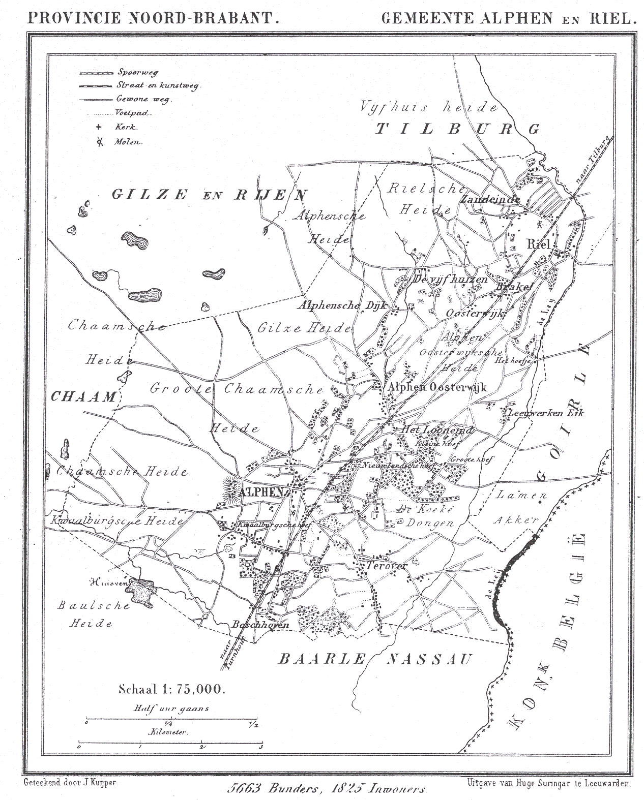 Nederland, Noord-Brabant, Gemeente Alphen en Riel